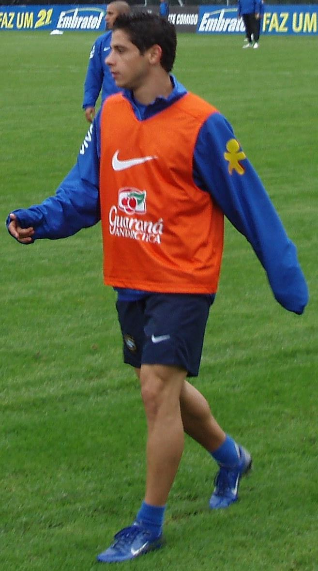 Cicinho, Spieler der brasilianischen Fußballnationalmannschaft